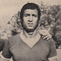 مصطفى رياض لاعب الترسانة